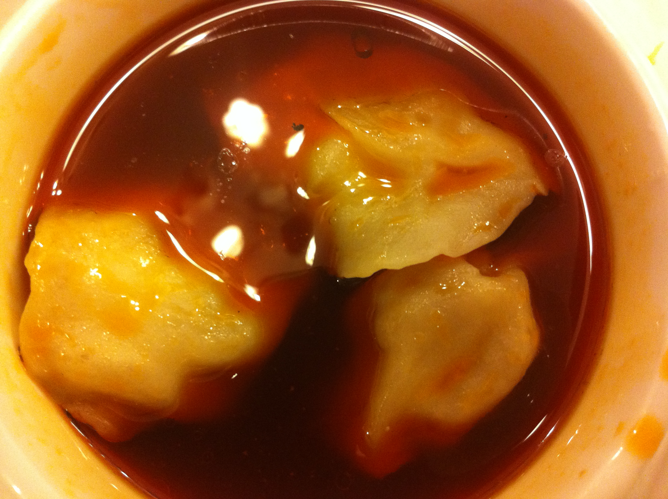 中文（中国大陆）: 抄手，成都龙抄手餐厅